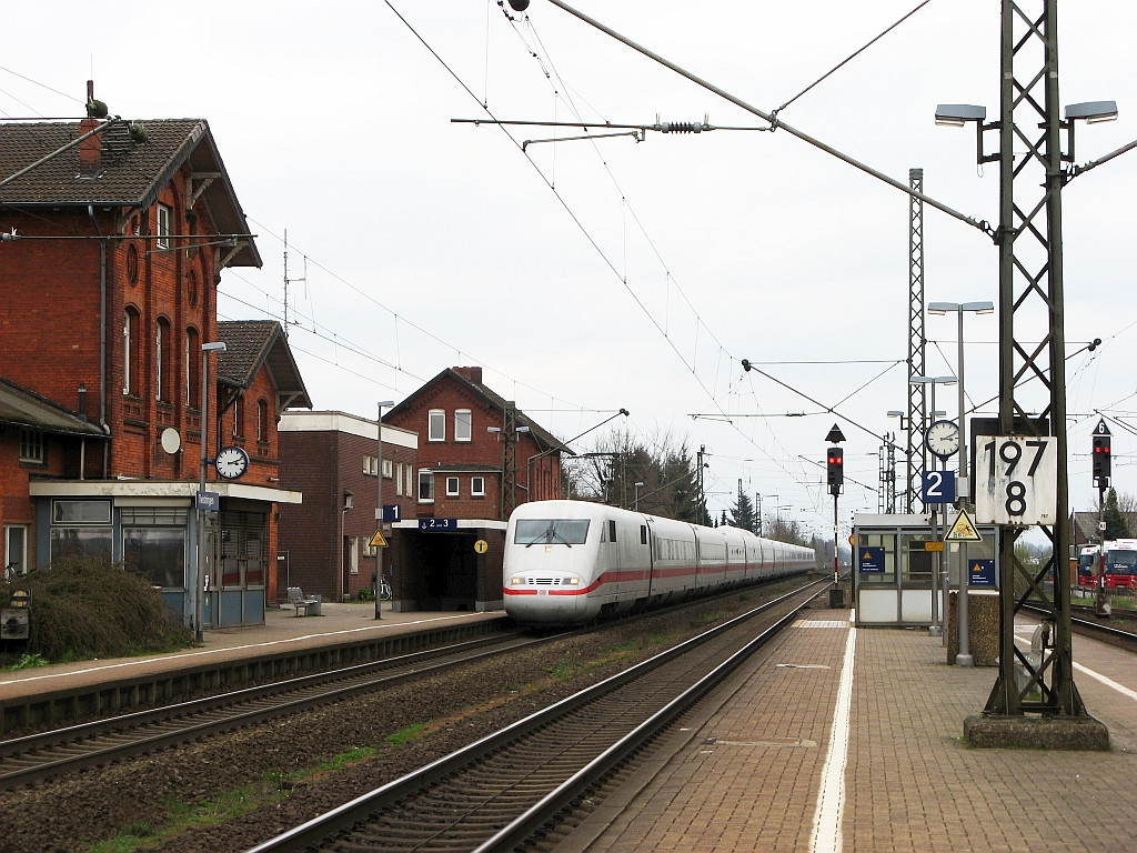 Bahnhof Twistringen